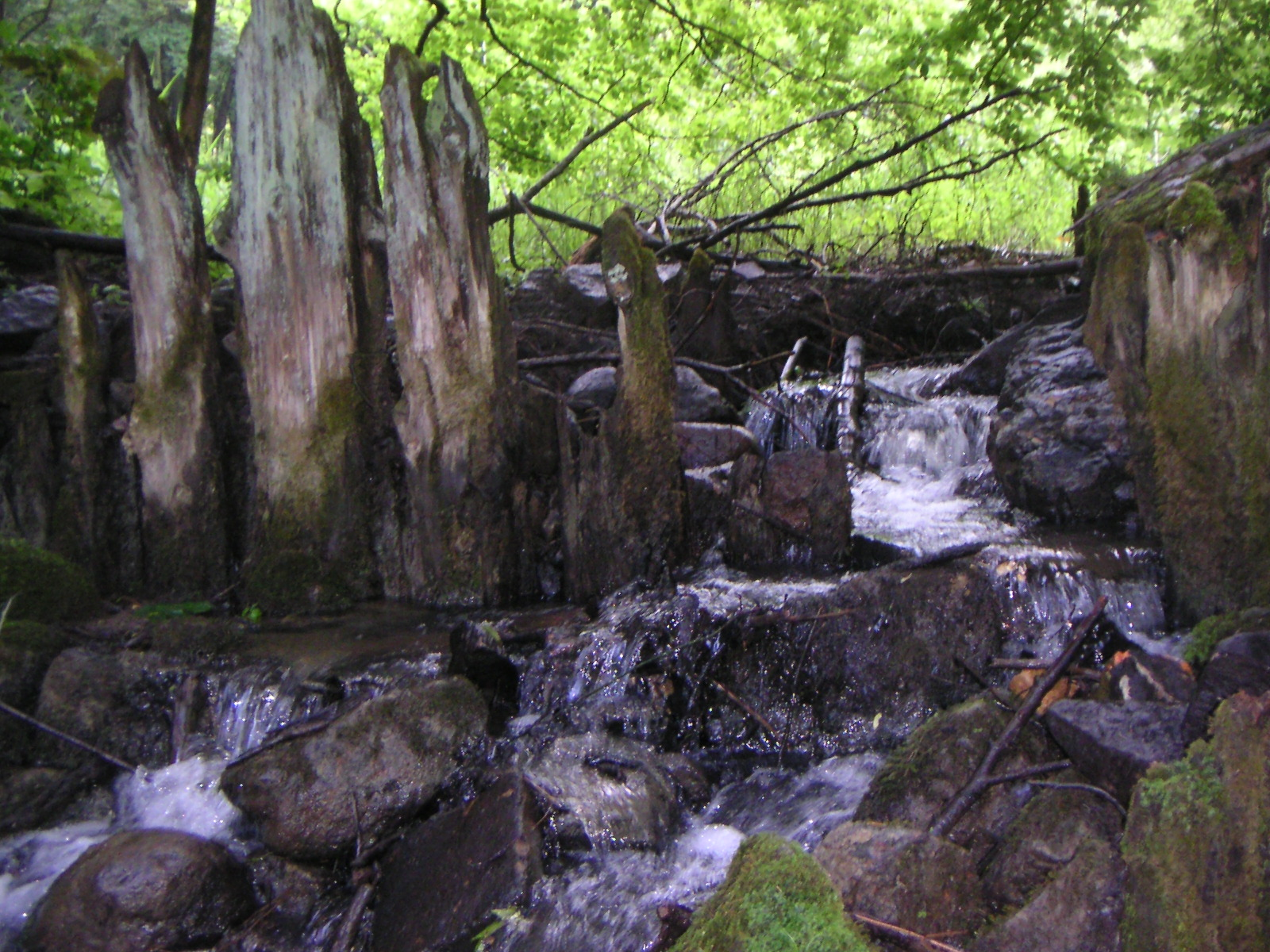 Szczeciński Park Krajobrazowy "Puszcza Bukowa", rezerwat przyrody "Bukowe Zdroje", Chojnówka, uroczysko Szwedzki Młyn